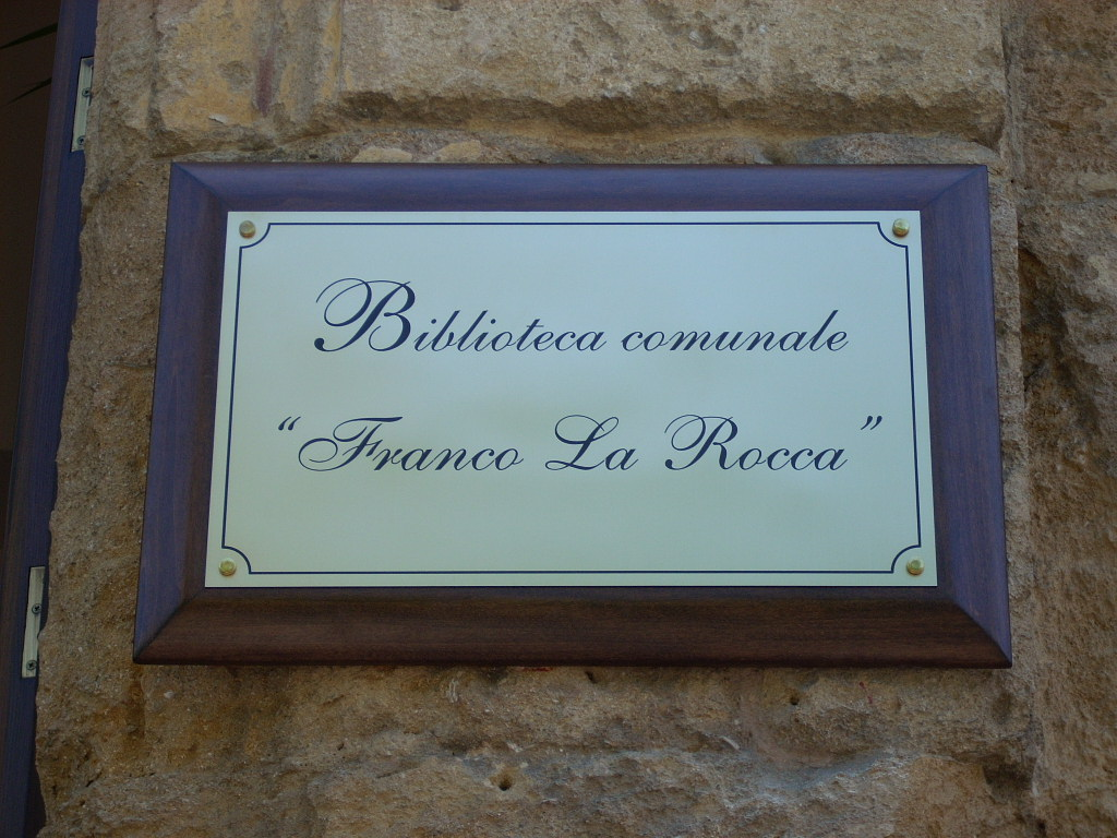 Targa della nuova Biblioteca Franco La Rocca di agrigento.